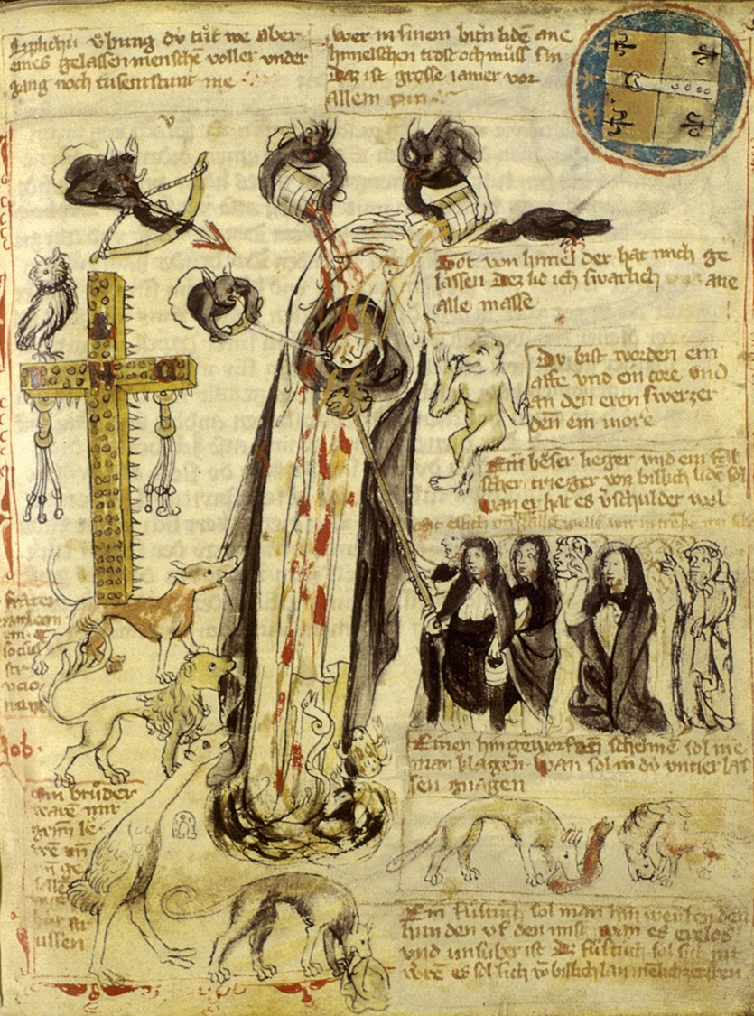 Henri Suso tourmenté